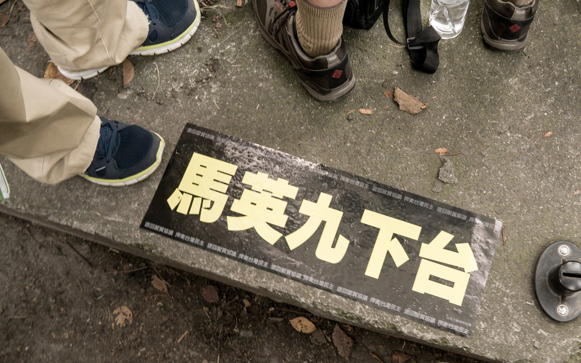 太陽花學運期間，抗議者在馬路貼上「馬英九下台」標語貼紙。